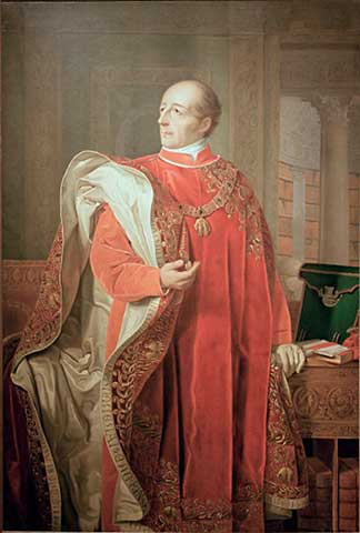 Johann Philipp von Stadion als österreichischer Minister